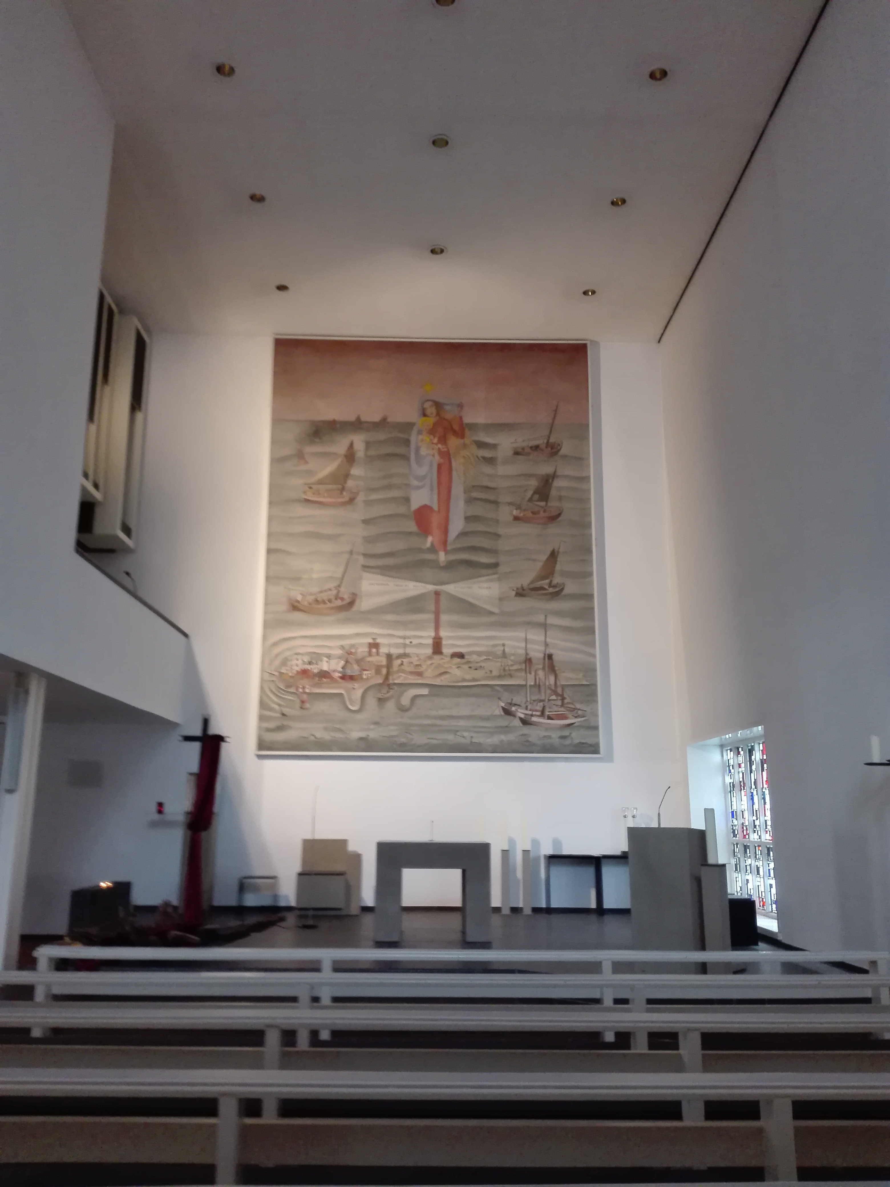 Katholische Kirche Stella Maris auf Norderney